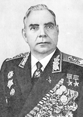 Николай Иванович Крылов (1903 — 1972) — советский военачальник